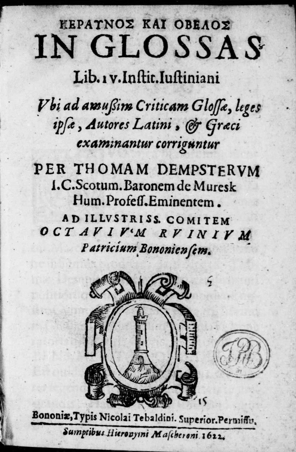 Frontespizio